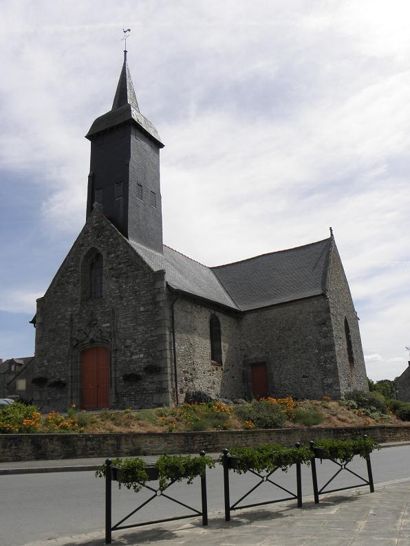 Église Saint-Pierre de Dourdain (35).